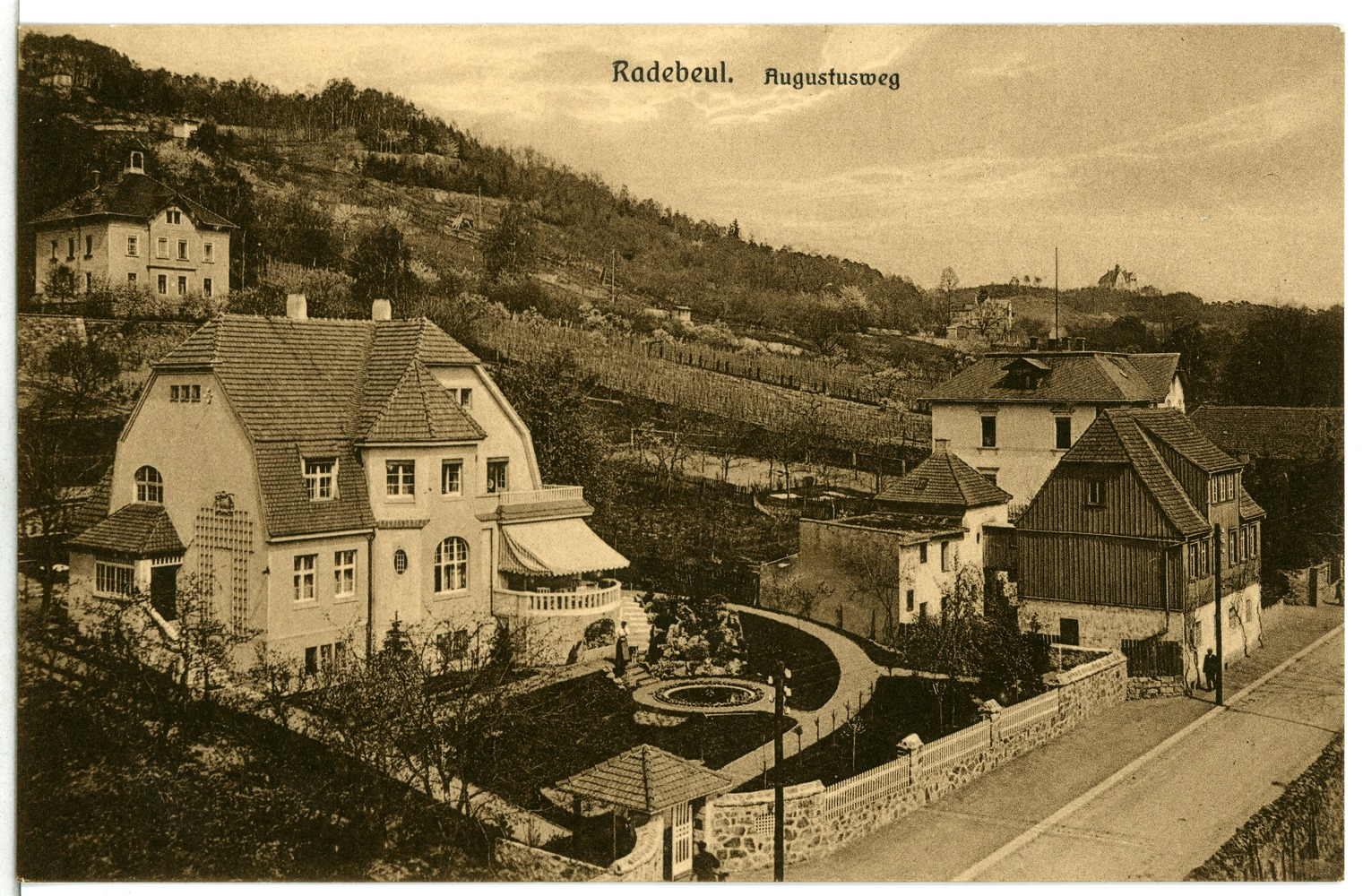 Radebeul; Augustus - Weg This postcard is from publisher Brück & Sohn in Meißen ( postcard has a unique number 13098 and is available in a higher resolution at the publisher. This images was uploaded in a cooperation project between Wikipedians and the publisher.